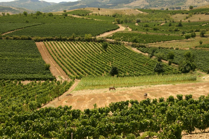 Лозја во близина на Кавадарци